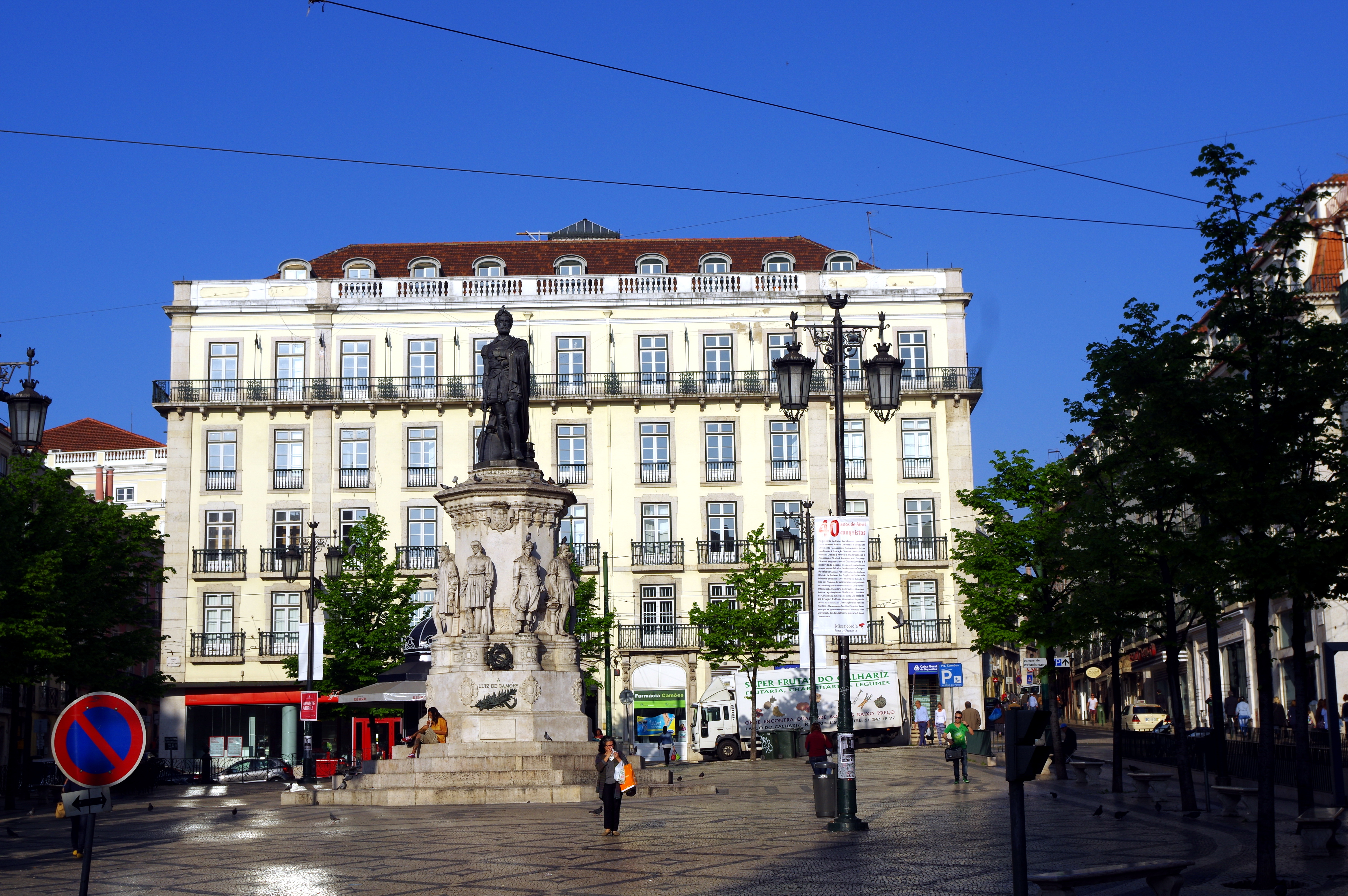 17.4.14 1 Lisbon 325